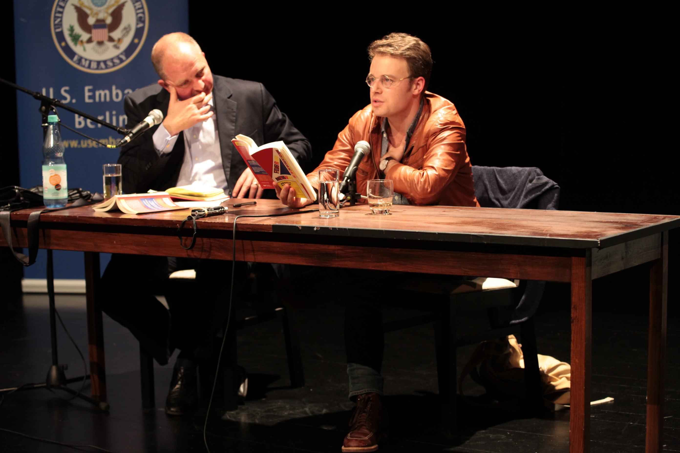 Joshua Cohen, der im September 2014 die American Academy besuchte, las aus seiner Kurzgeschichtensammlung „Four Messages“ im English Theatre Berlin in Berlin-Kreuzberg.